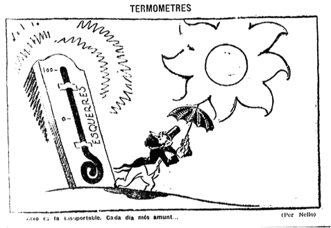 389 07,8,1935 humanitat